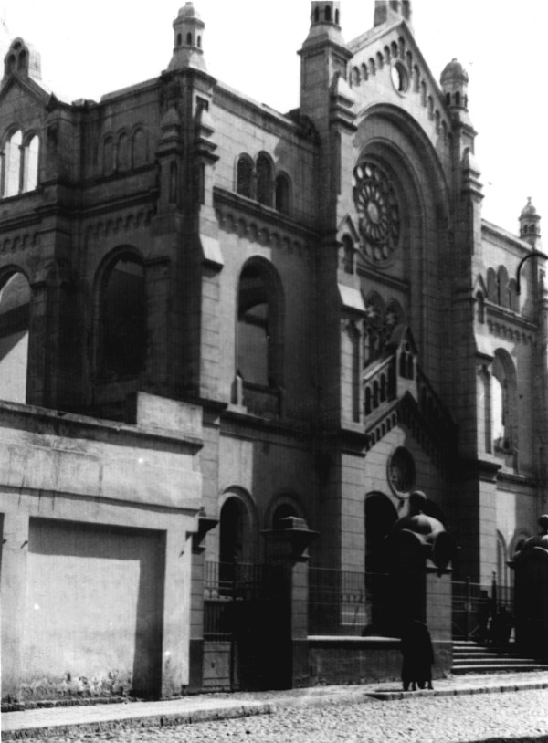 Synagoga Ezras Izrael w Łodzi.